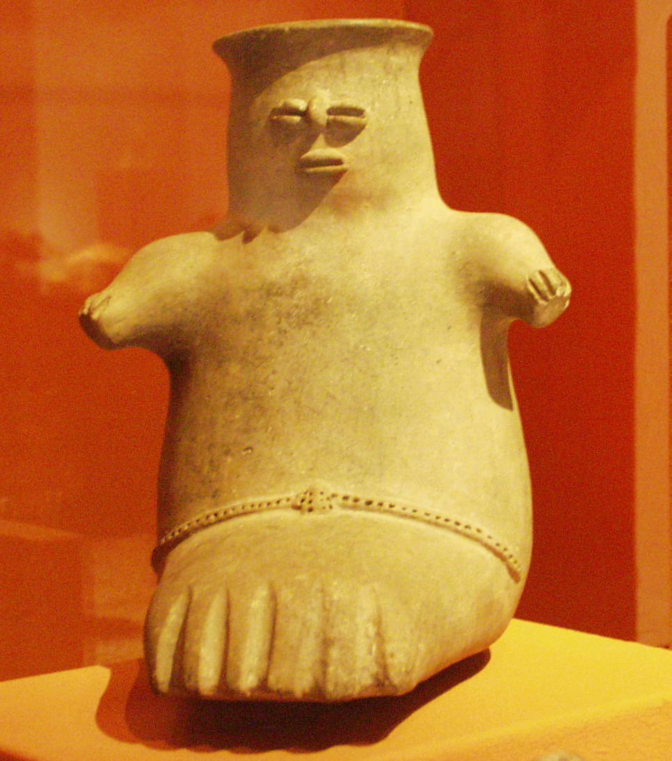 Amparo Museum in Puebla, Mexico.